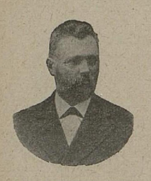 Josef Podbrdský (1847-1930), rakouský právník a politik české národnosti z Čech